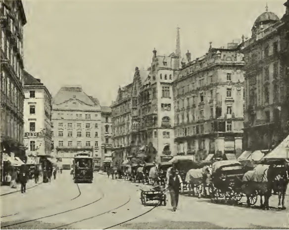 Wien - Straße. Details siehe Dateiname.